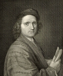 Franceschini, Marcantonio (1648-1729) -- Portraits Format Taille douce ; 19,8 x 26,5 cm (à la cuvette) ; 51 x 36 cm Source Ancienne bibliothèque (coll. antérieures à 1863)